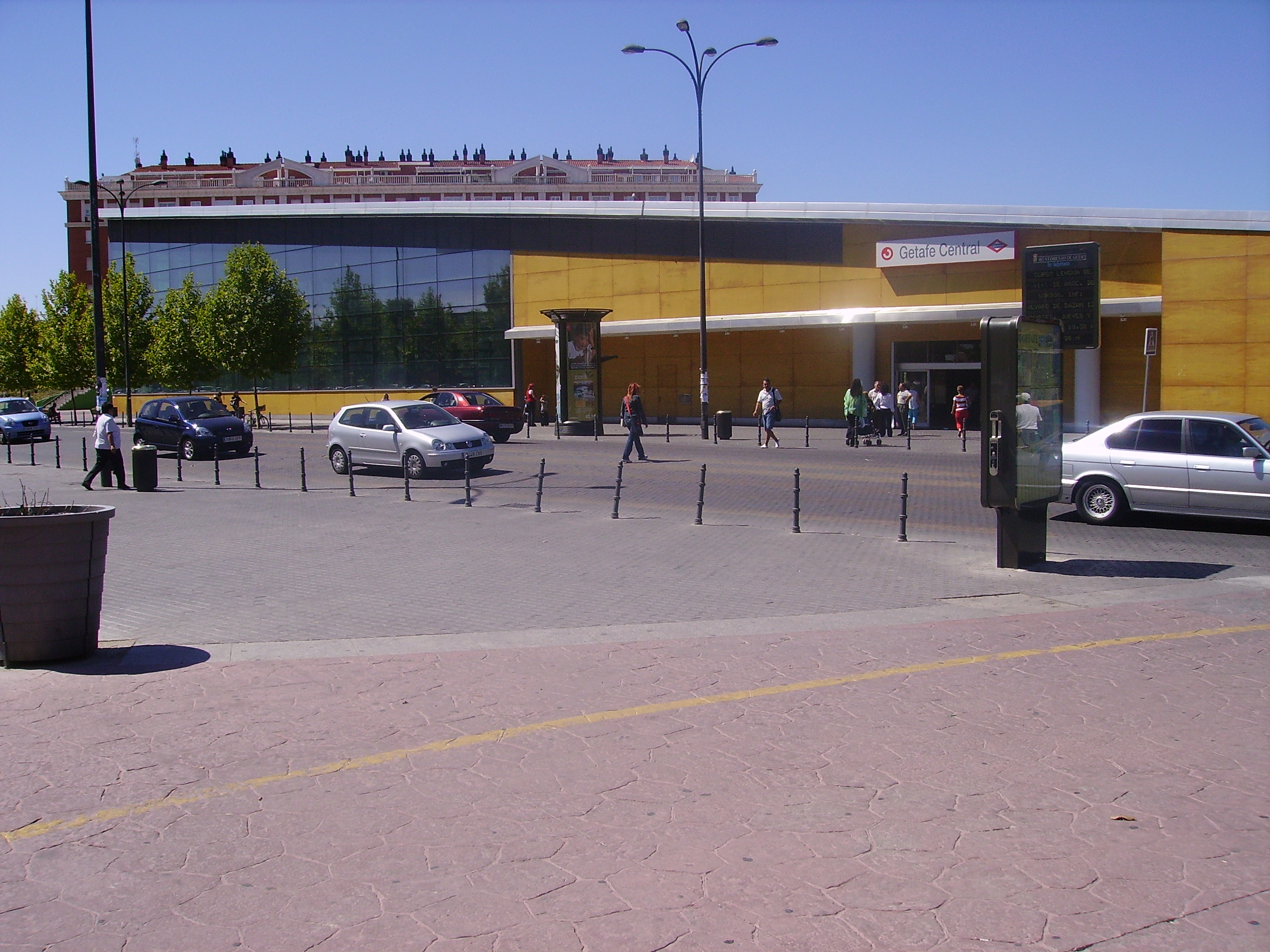 Edificio de la estación visto desde la calle Ramón y Cajal (Getafe, España).